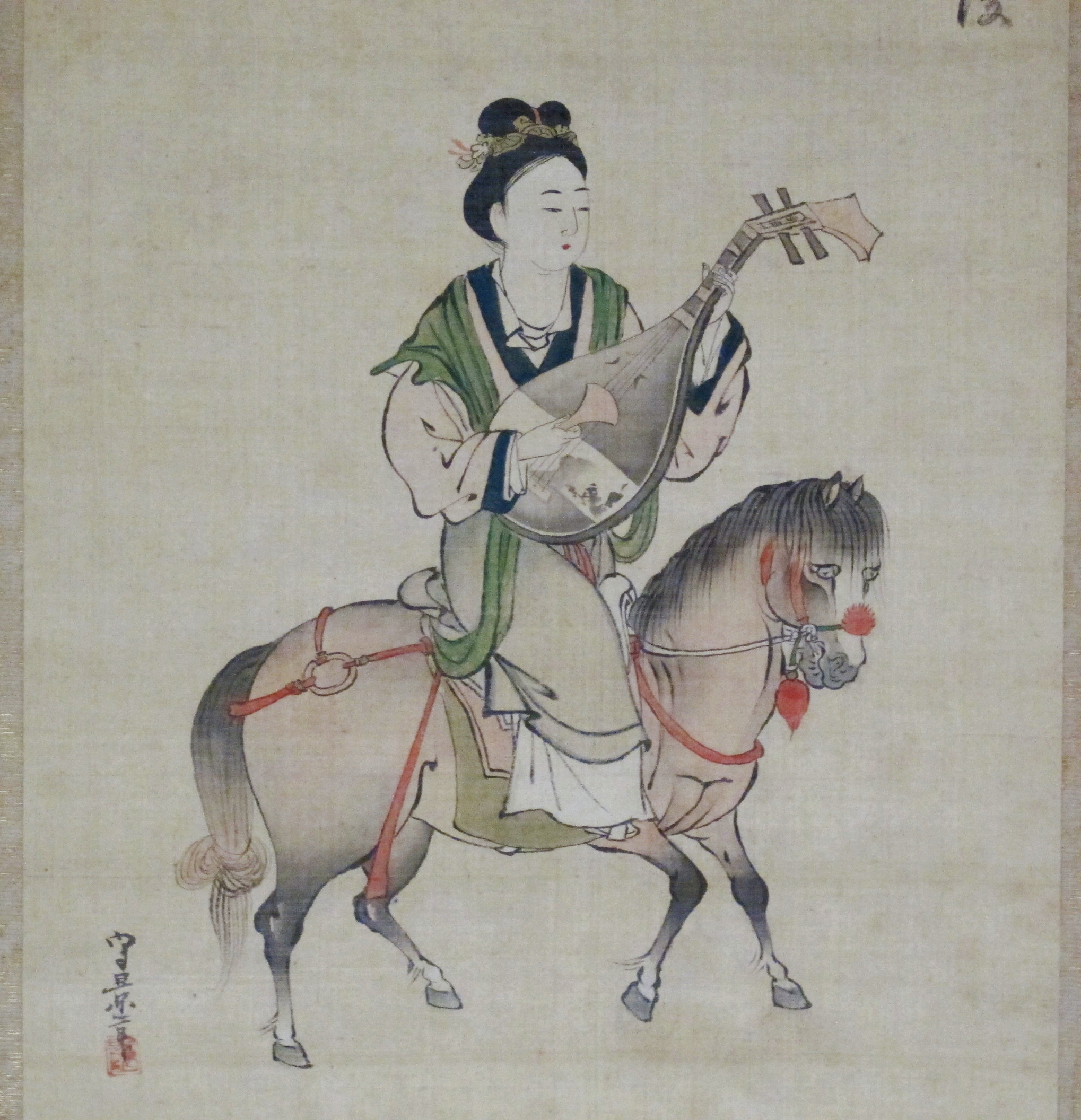 Periodo edo, kosumi morihage, wang zhaojun, XVII sec.